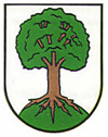 Wappen von Fahy Kanton Jura Schweiz